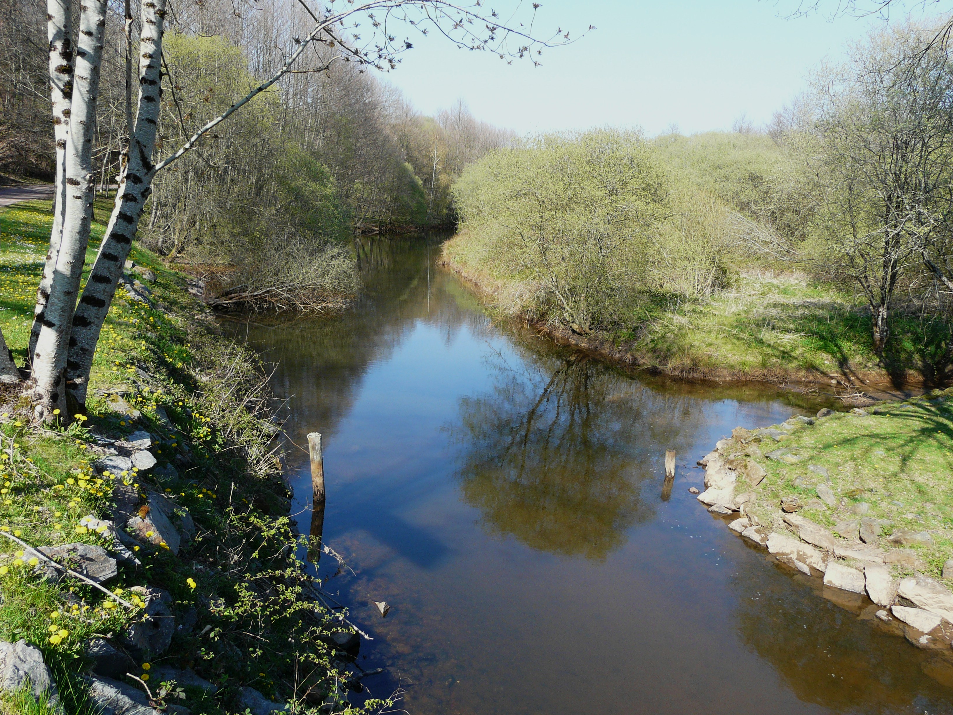 La Côle en amont du pont de la route départementale 79, Mialet, Dordogne, France.